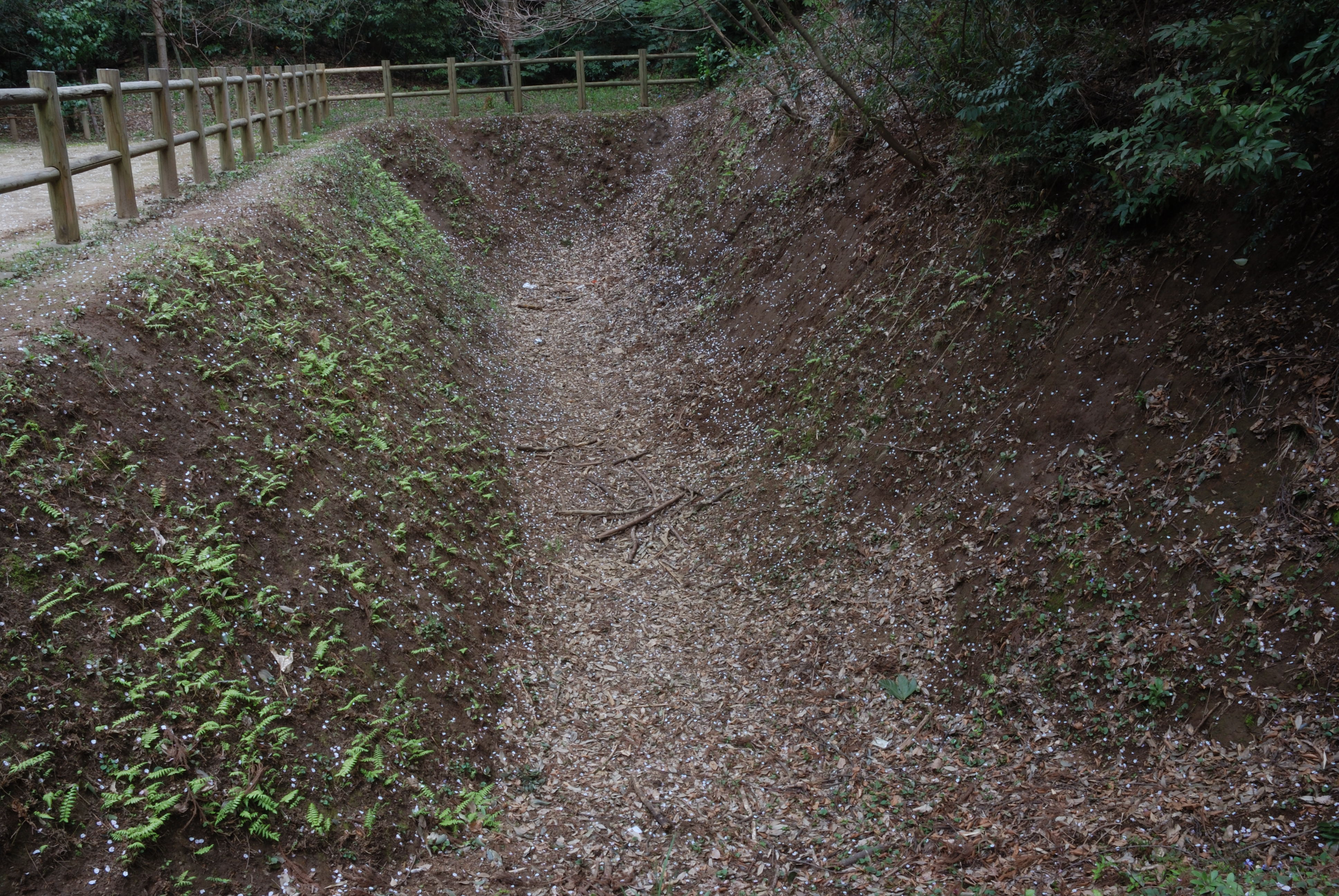 Kogane castle shojibori